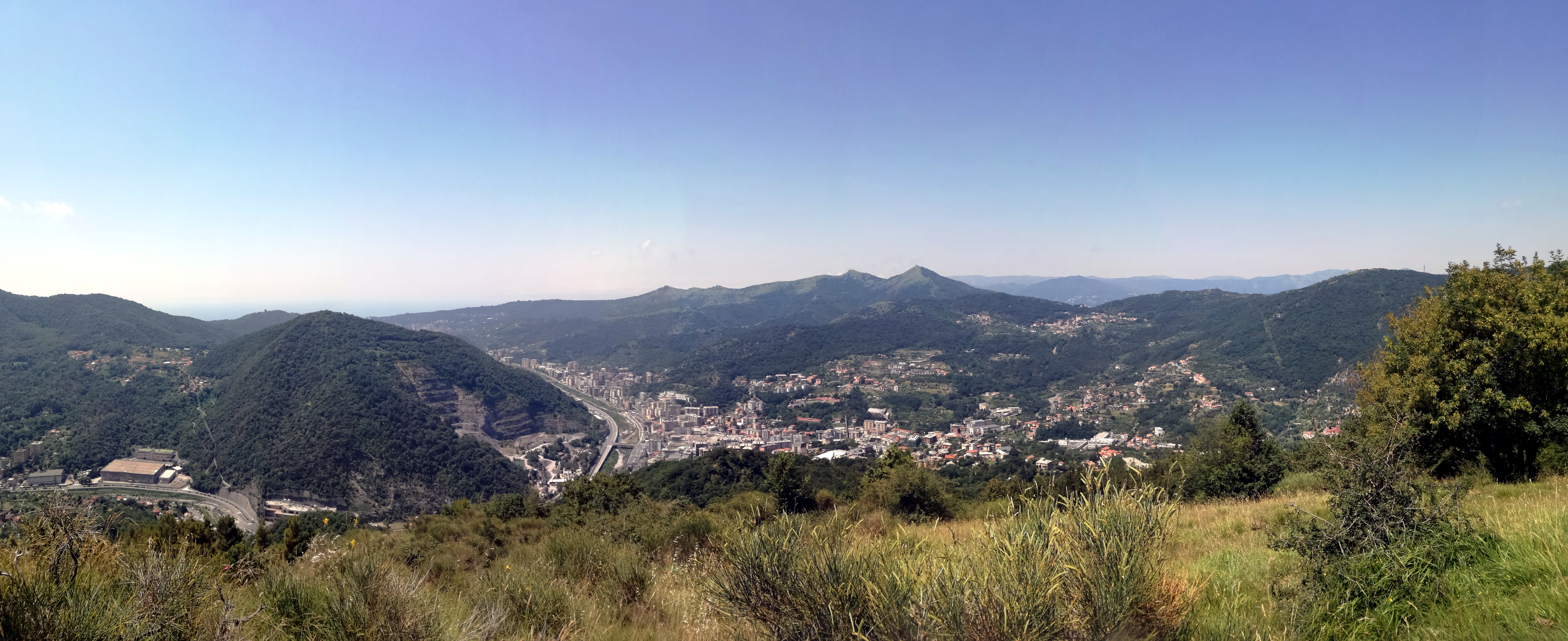 Panorama con a sinistra Sant'Eusebio, a destra la valle del Geirato